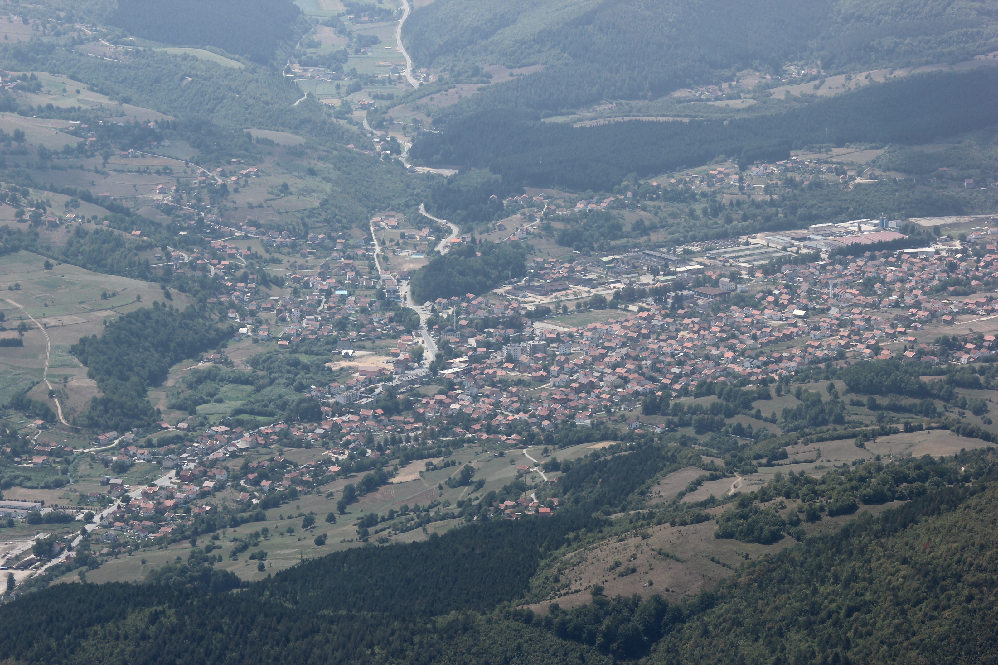 Blick vom Vlašić auf den Ort Turbe (Bosnien und Herzegowina).